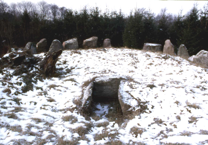 Pipstorn